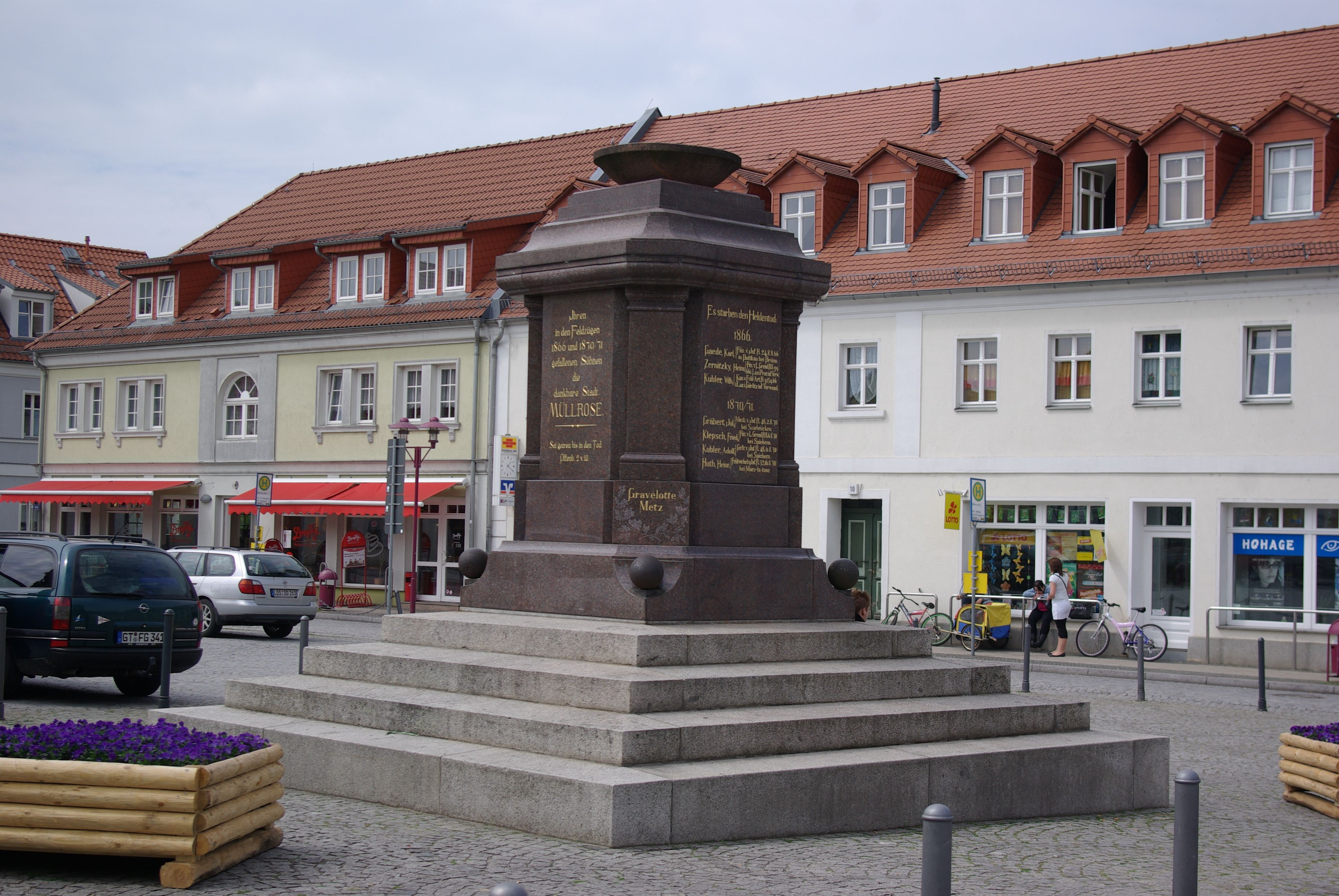 Müllrose in Brandenburg. Der Marktplatz in Müllrose mit dem Denkmal in der Mitte stehen unter Denkmalschutz.